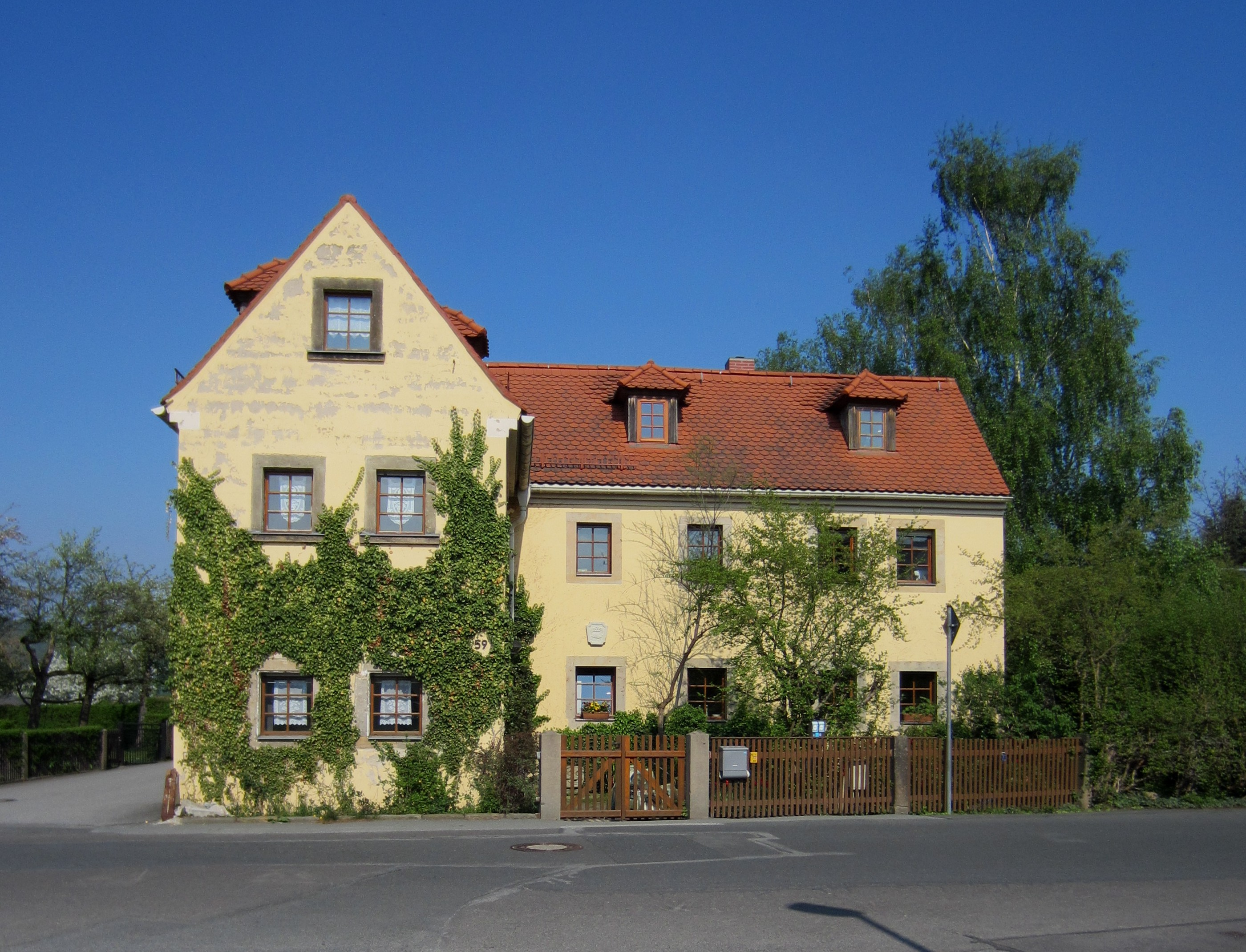 Denkmalgeschütztes Wohnhaus Söbrigener Straße 59 in Dresden-Söbrigen